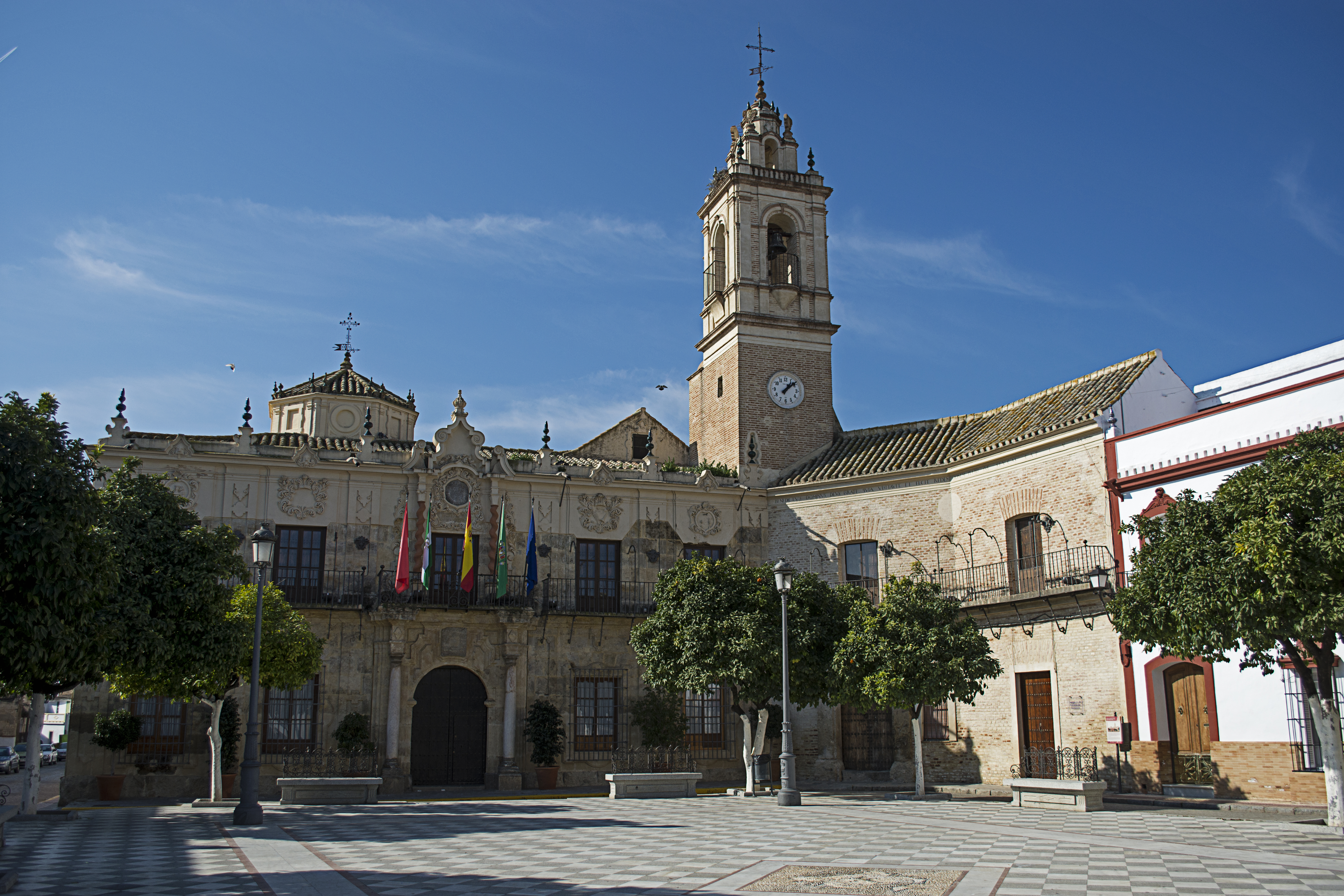 Edificio del ayuntamiento (Casas Capitulares) de Lora del Río